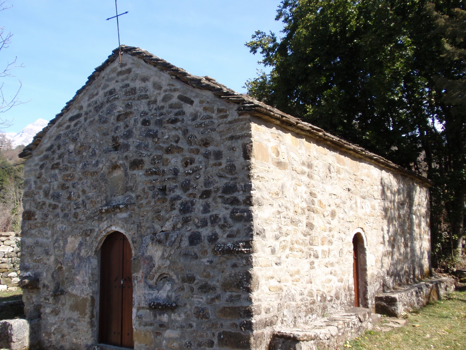 Ιερός Ναός Υπαπαντής Χριστού Λεπιανών, Έτος Ανέγερσης 1415